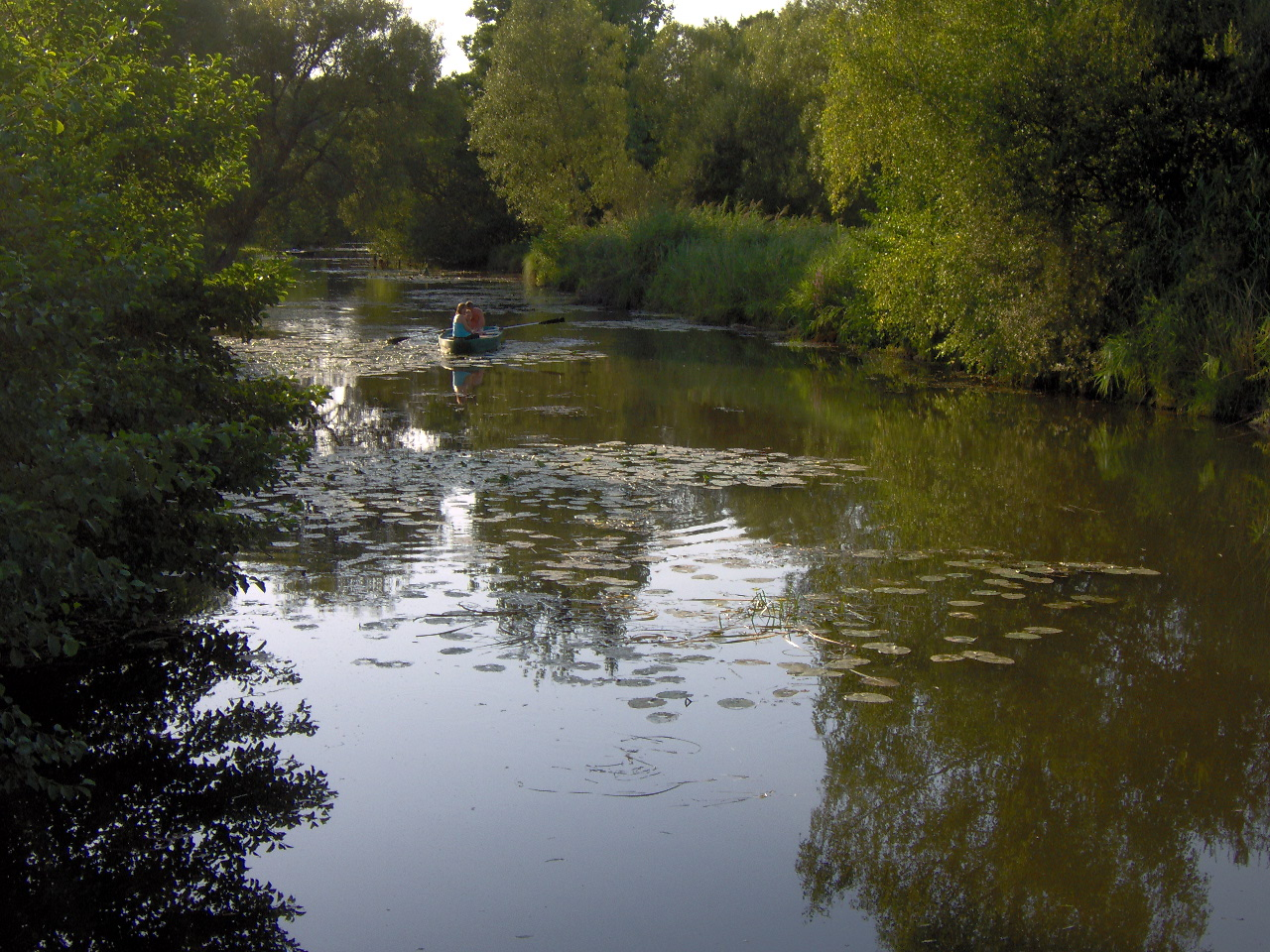 Rivière. Touraine. Indre-et-Loire. Barque. Pêcheurs. Nénuphars